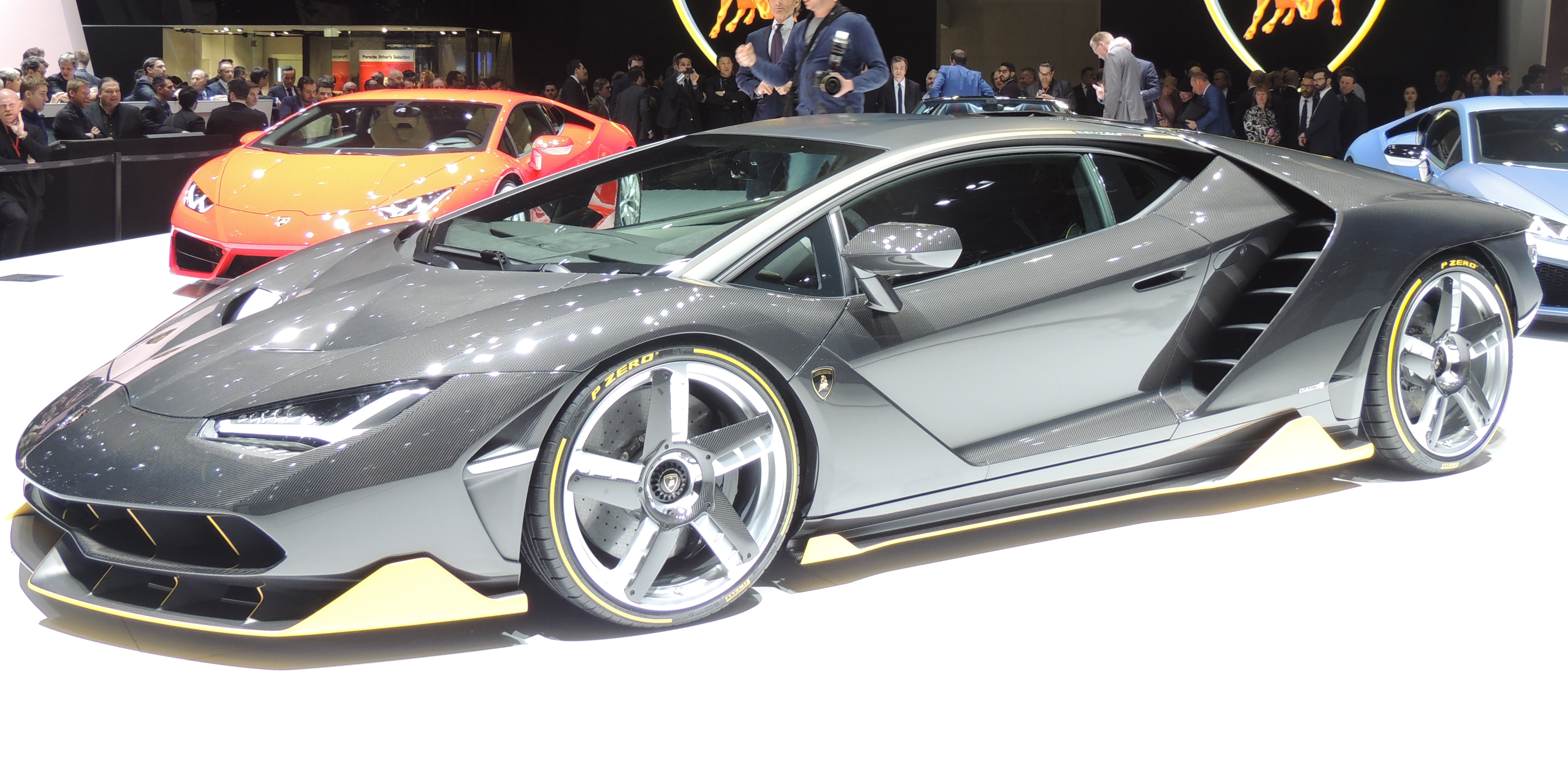 Lamborghini Centenario, salon de Genève 2016